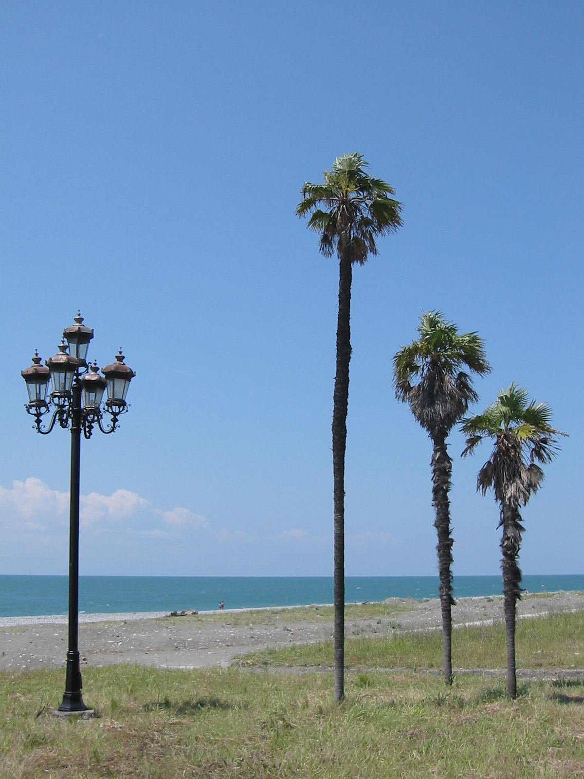 Beach in pitsunda